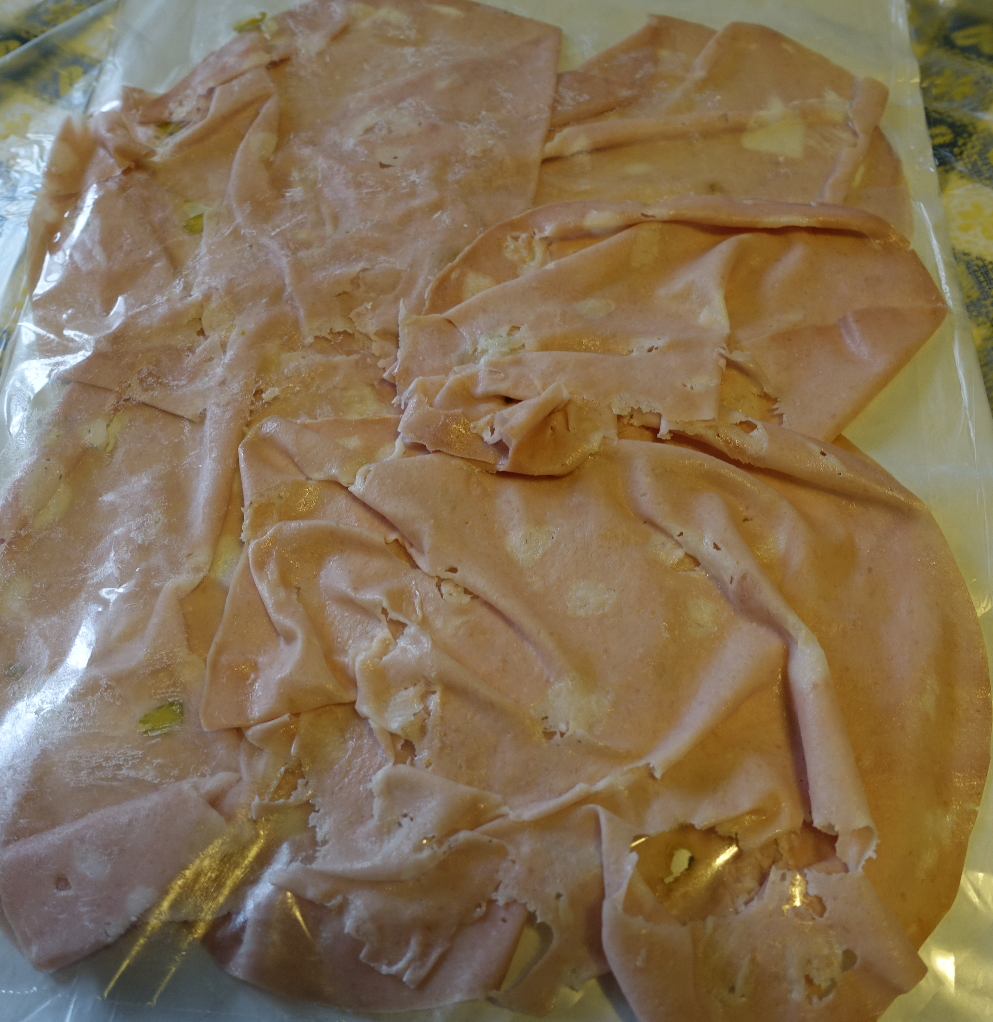 Mortadella affettata